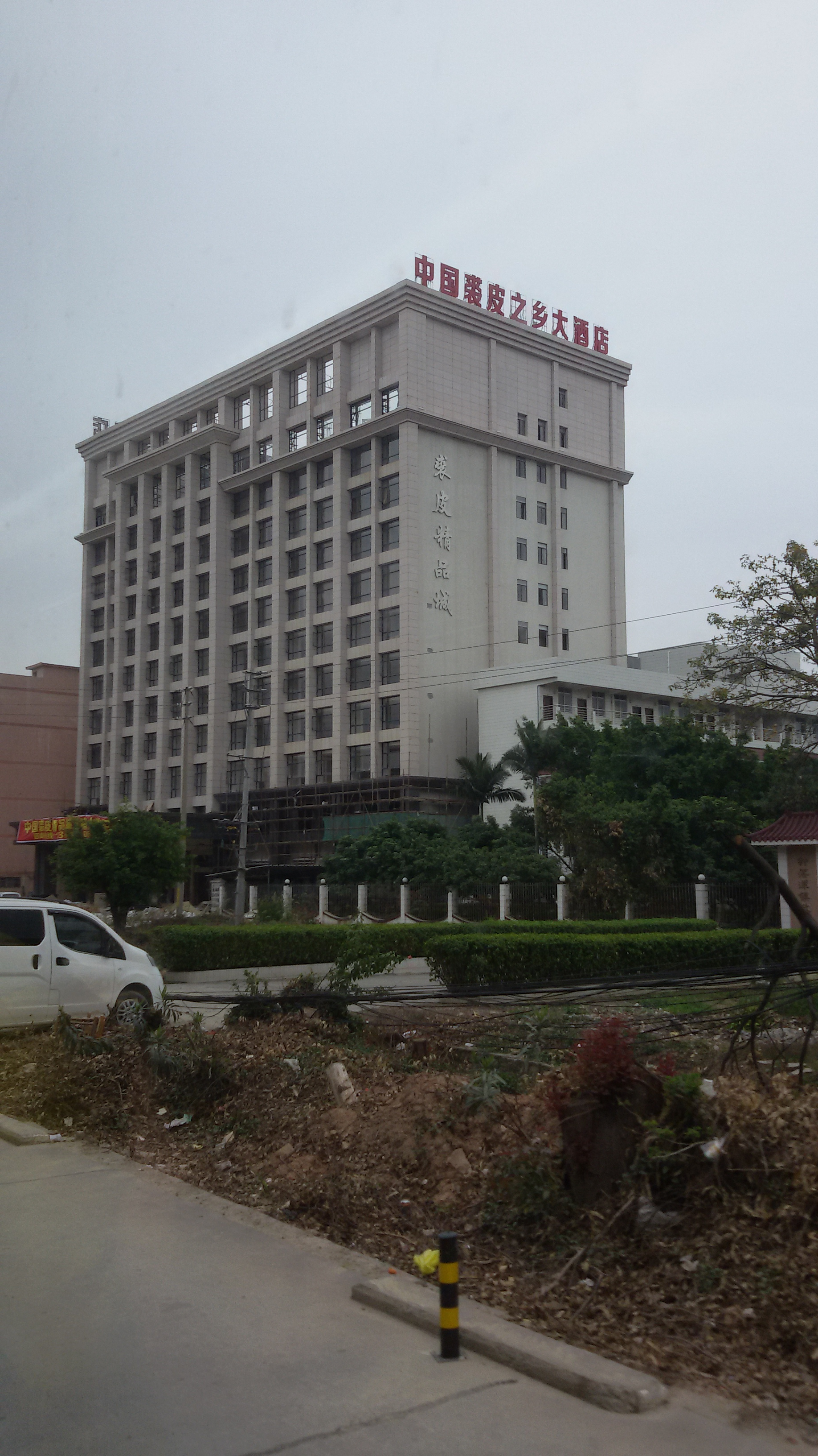 粵語: 中国裘皮之乡大酒店